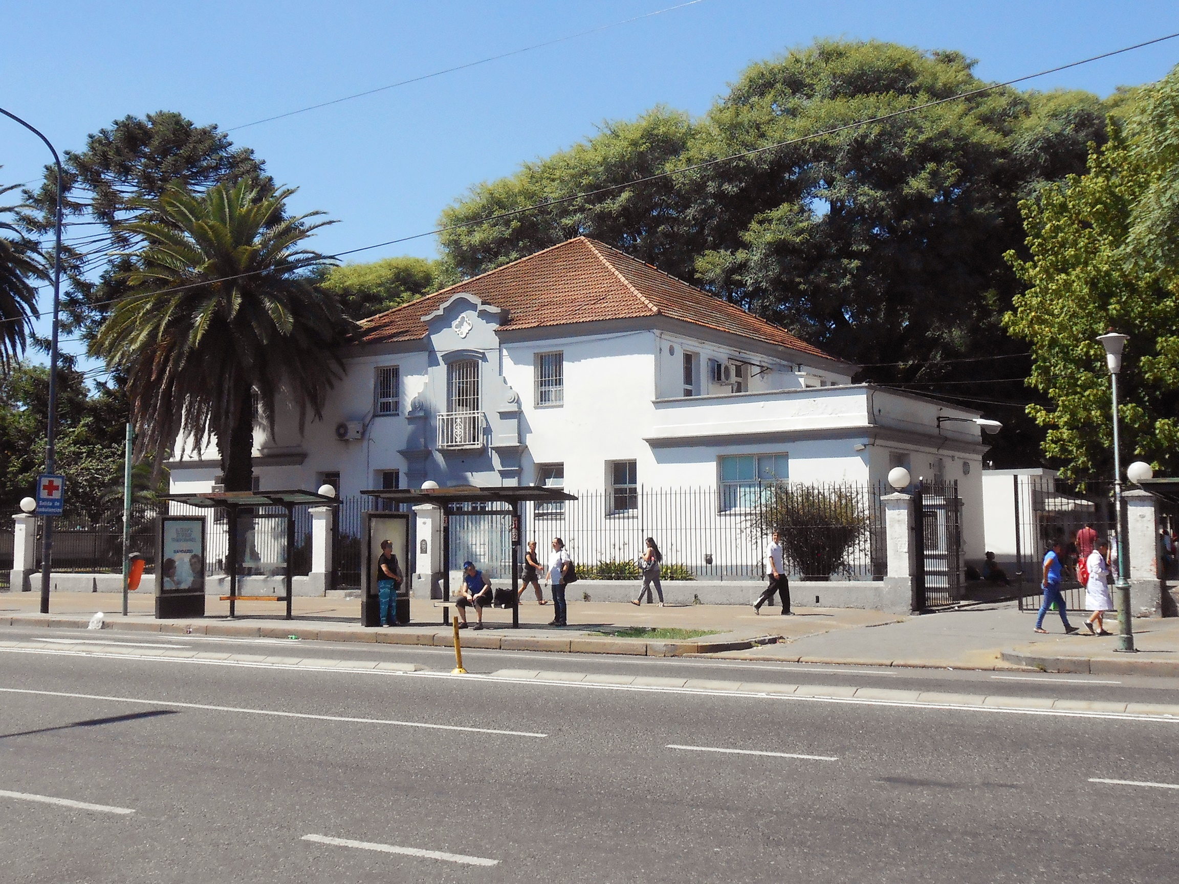 Hospital Penna - vista desde Av. Almafuerte - Buenos Aires